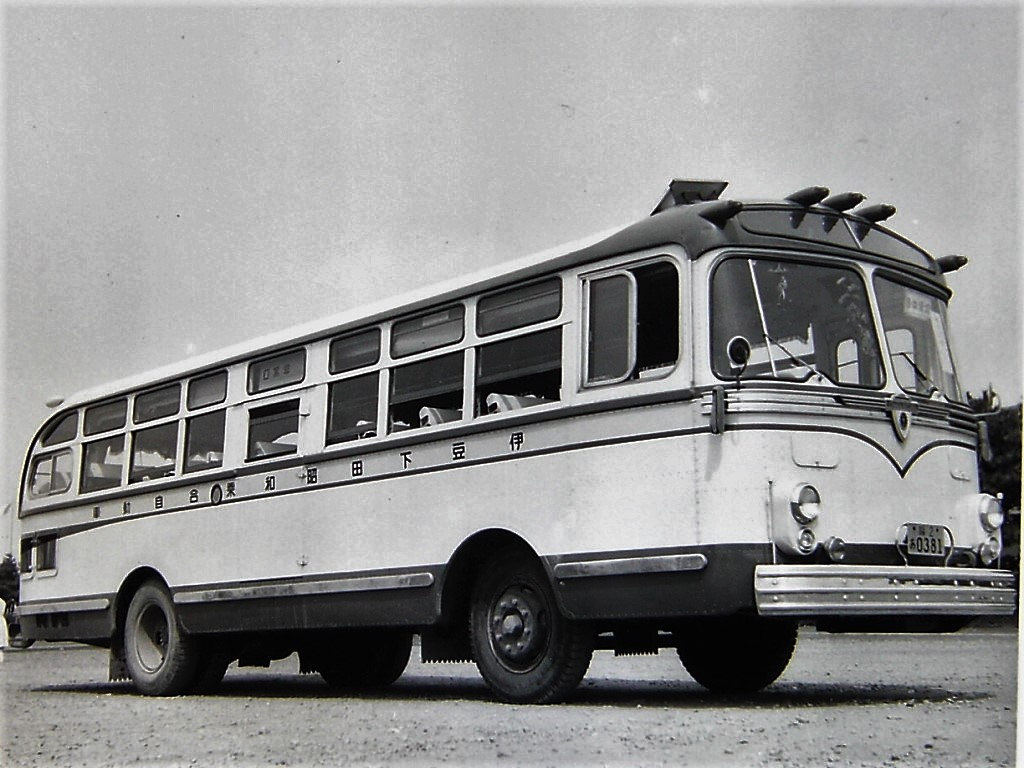 いすゞBA341P型バス 川崎航空機車体 伊豆下田乗合自動車